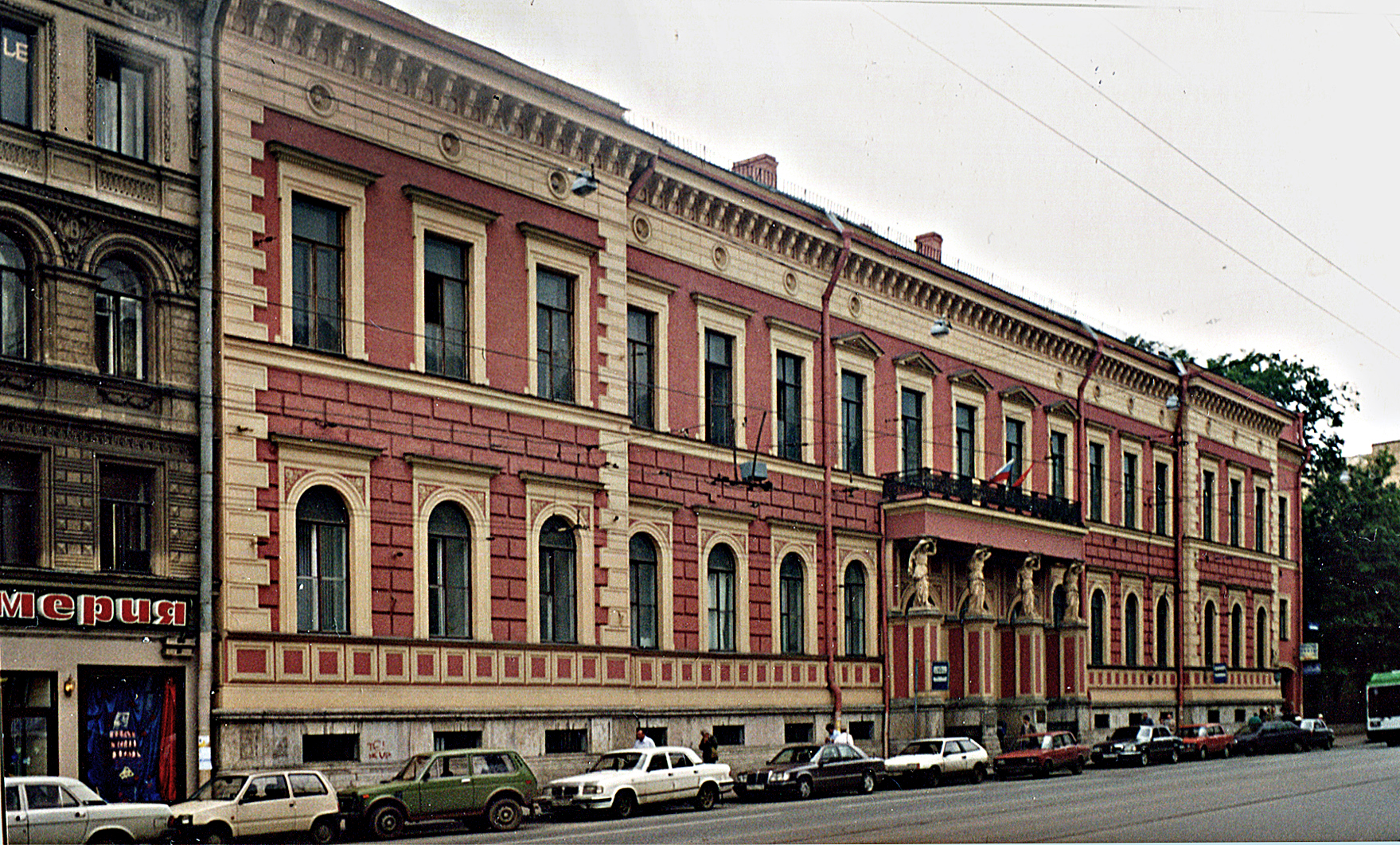 Литейный пр.д.39. Особняк_Пашкова. _Боссе